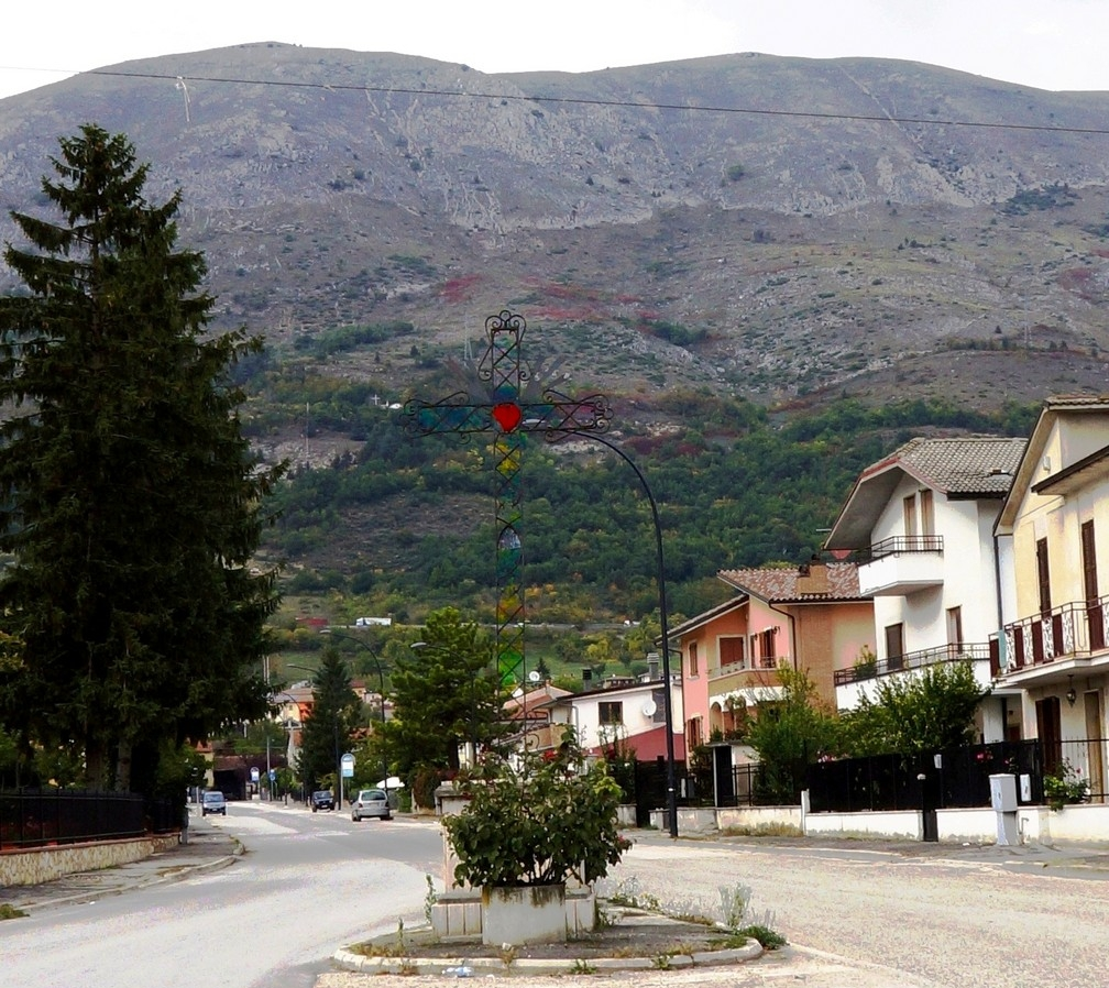 Pietragrossa di Paterno di Avezzano